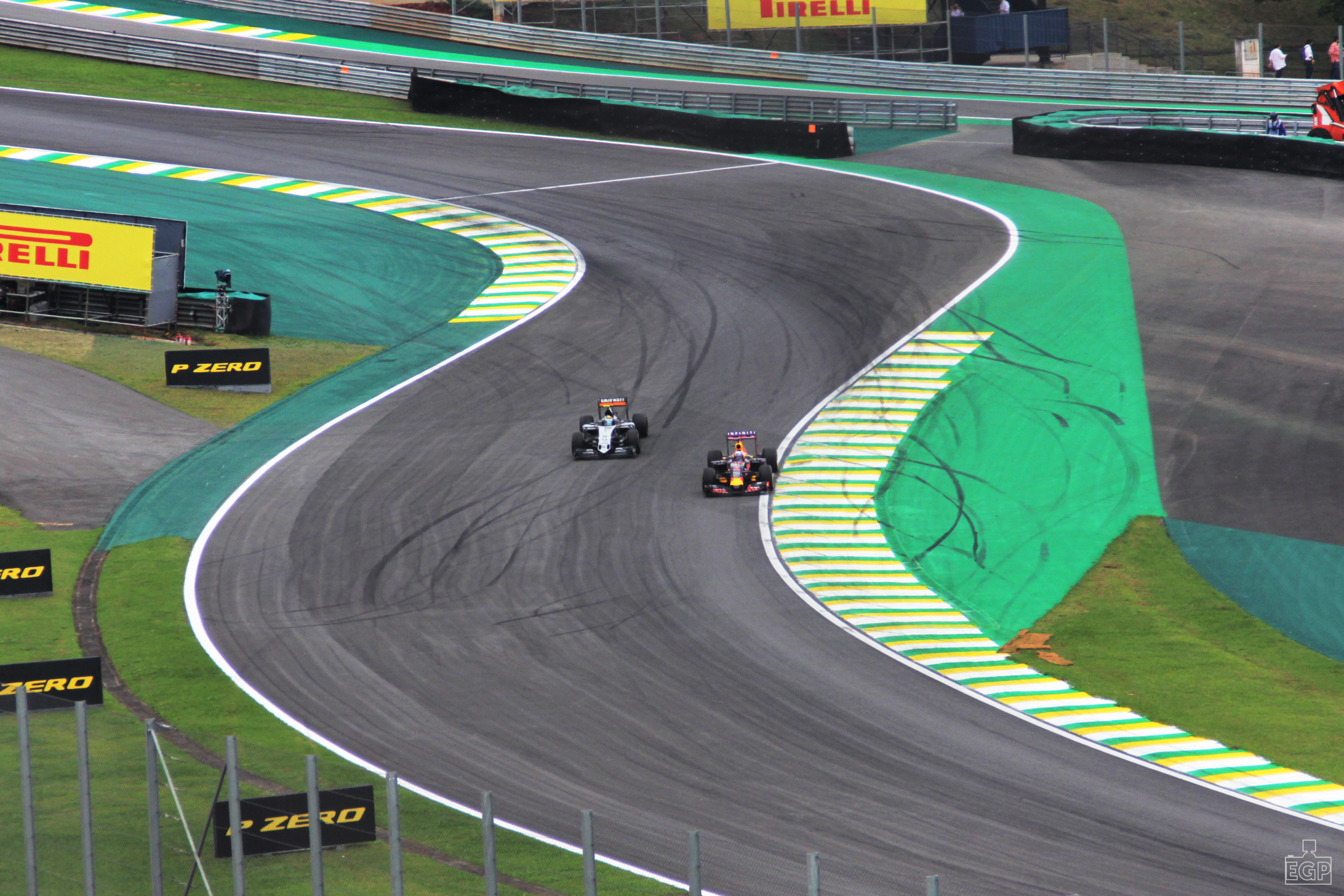 Formula 1